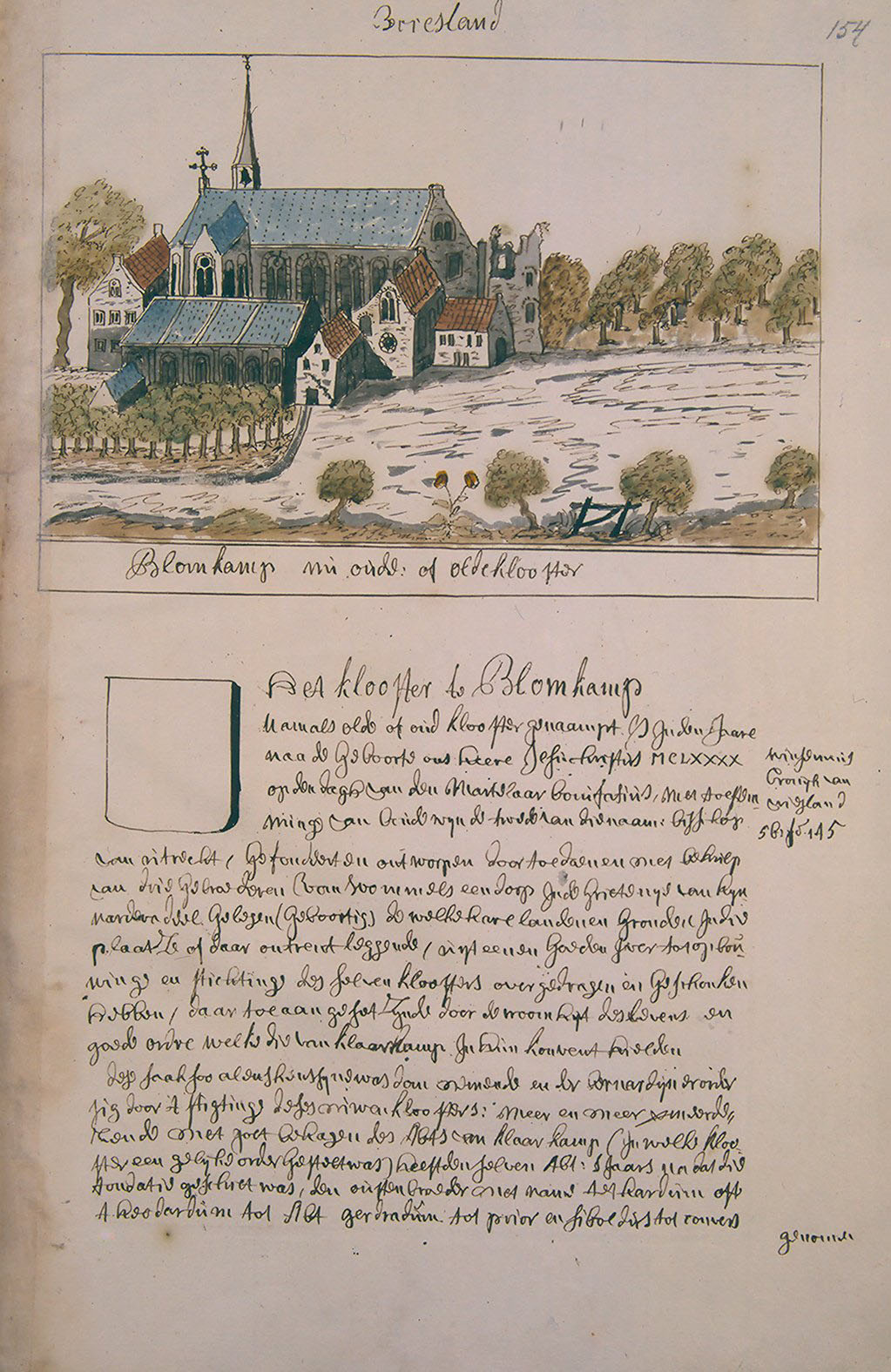 Korte Beschreijving van de Steden Dorpen Gehugten en Heeren-huizen der Heerlykheid Vriesland Benevens Desselfs Afbeeldingen Meest na 't leven getekent By een Vergaderdt Door Andries Schoemaker